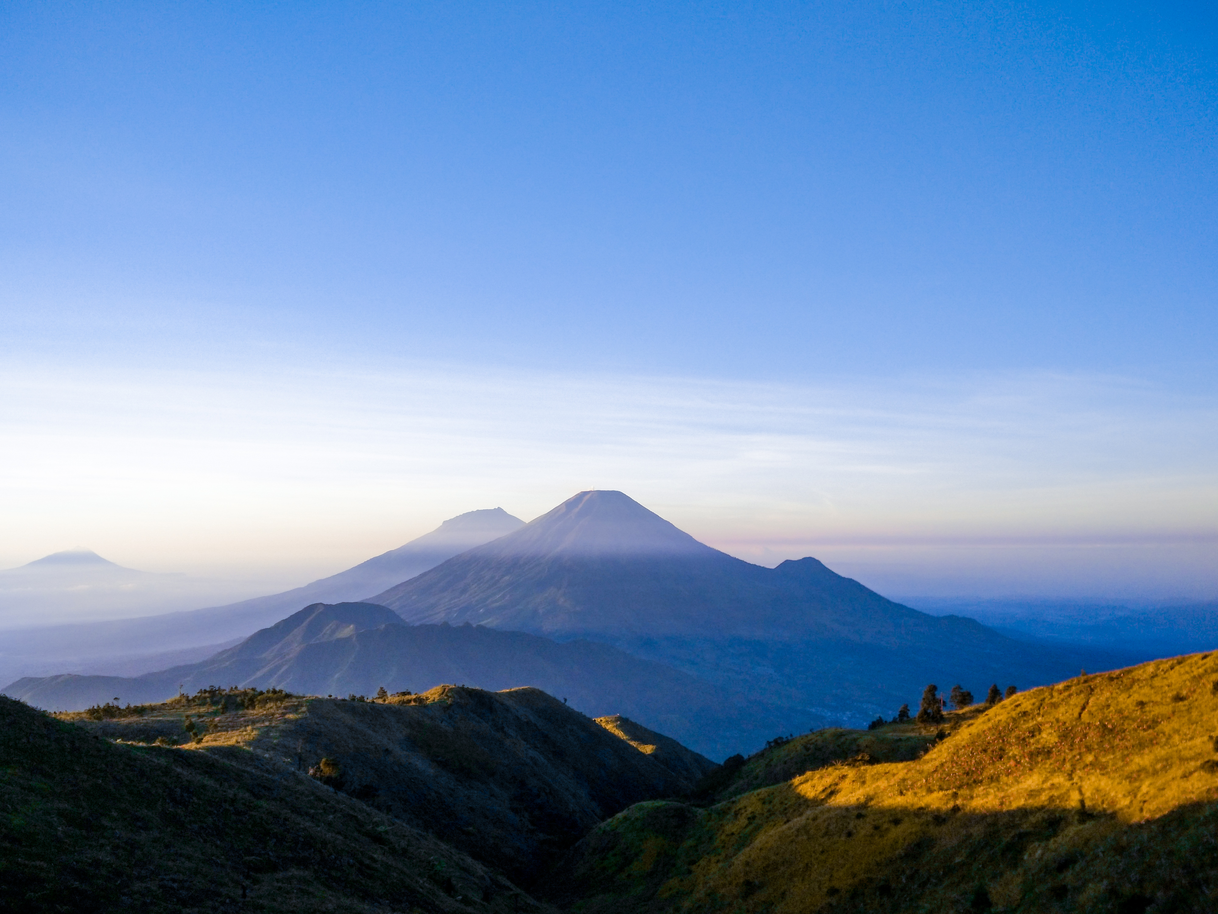 sinoro sumbing dapat dilihat dari puncak gunung prau wonosobo ,dieng jawa tengah